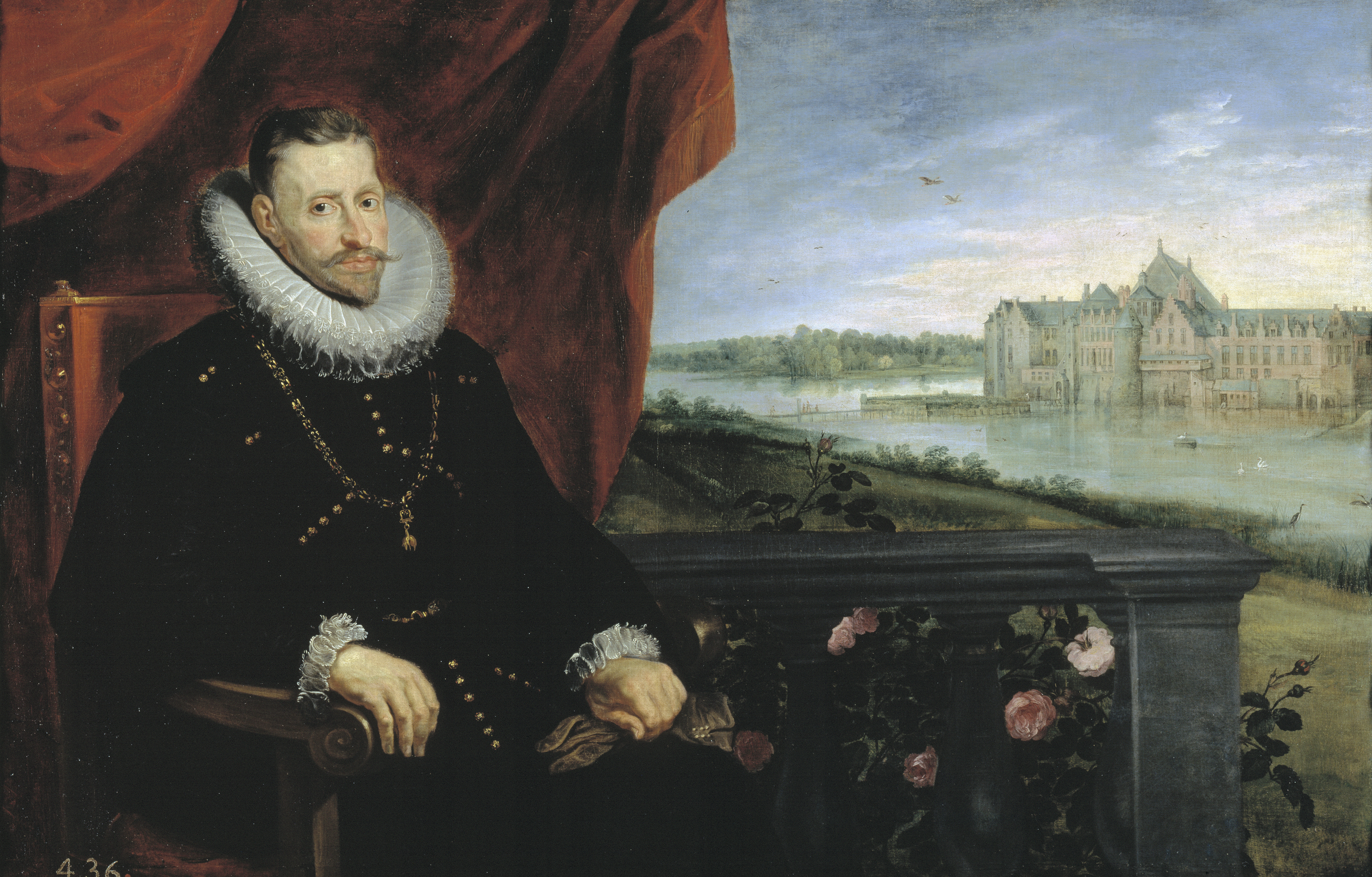 Retrato del archiduque Alberto de Austria (1559-1621), que fue hijo del emperador Maximiliano II de Habsburgo y de la emperatriz María de Austria y Portugal.